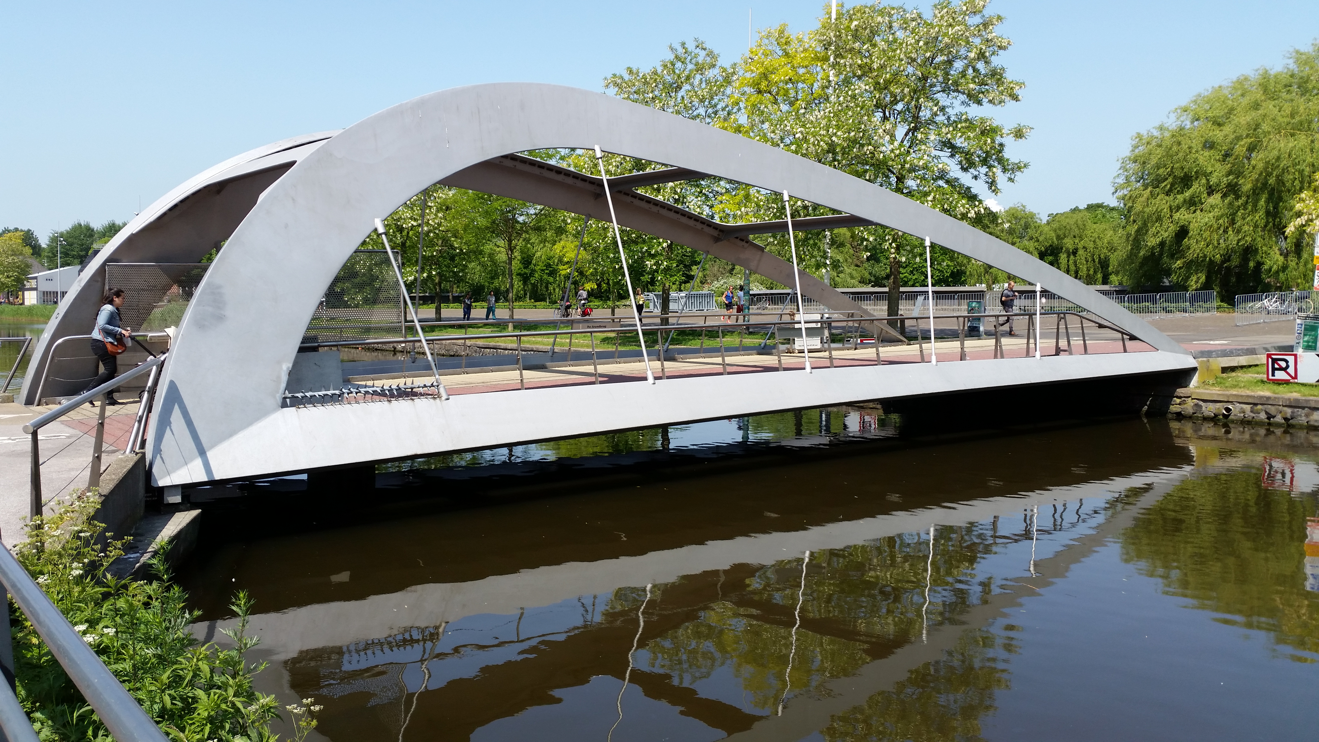 Brug 1973, De Arendbrug over de Haarlemmertrekvaart, Amsterdam, de overspanning naar het westen gezien